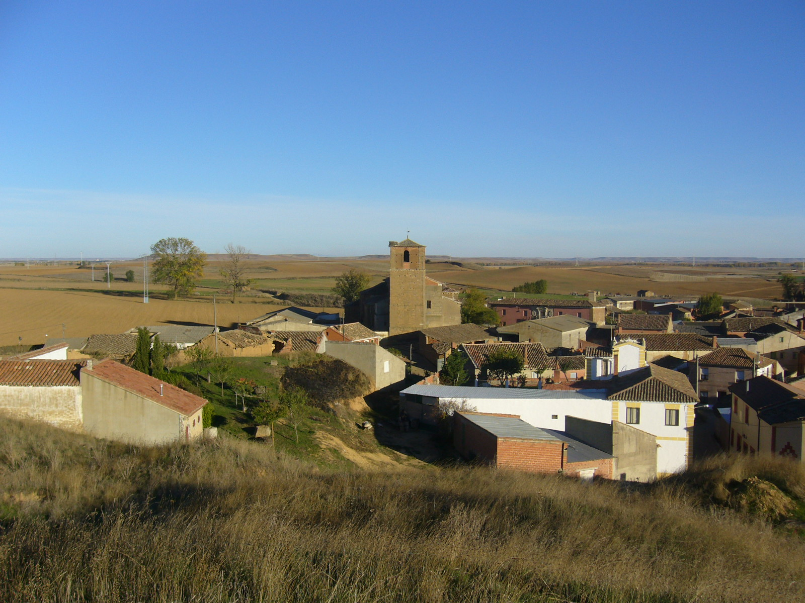 Vista de Villadiezma, Provincia de Palencia.